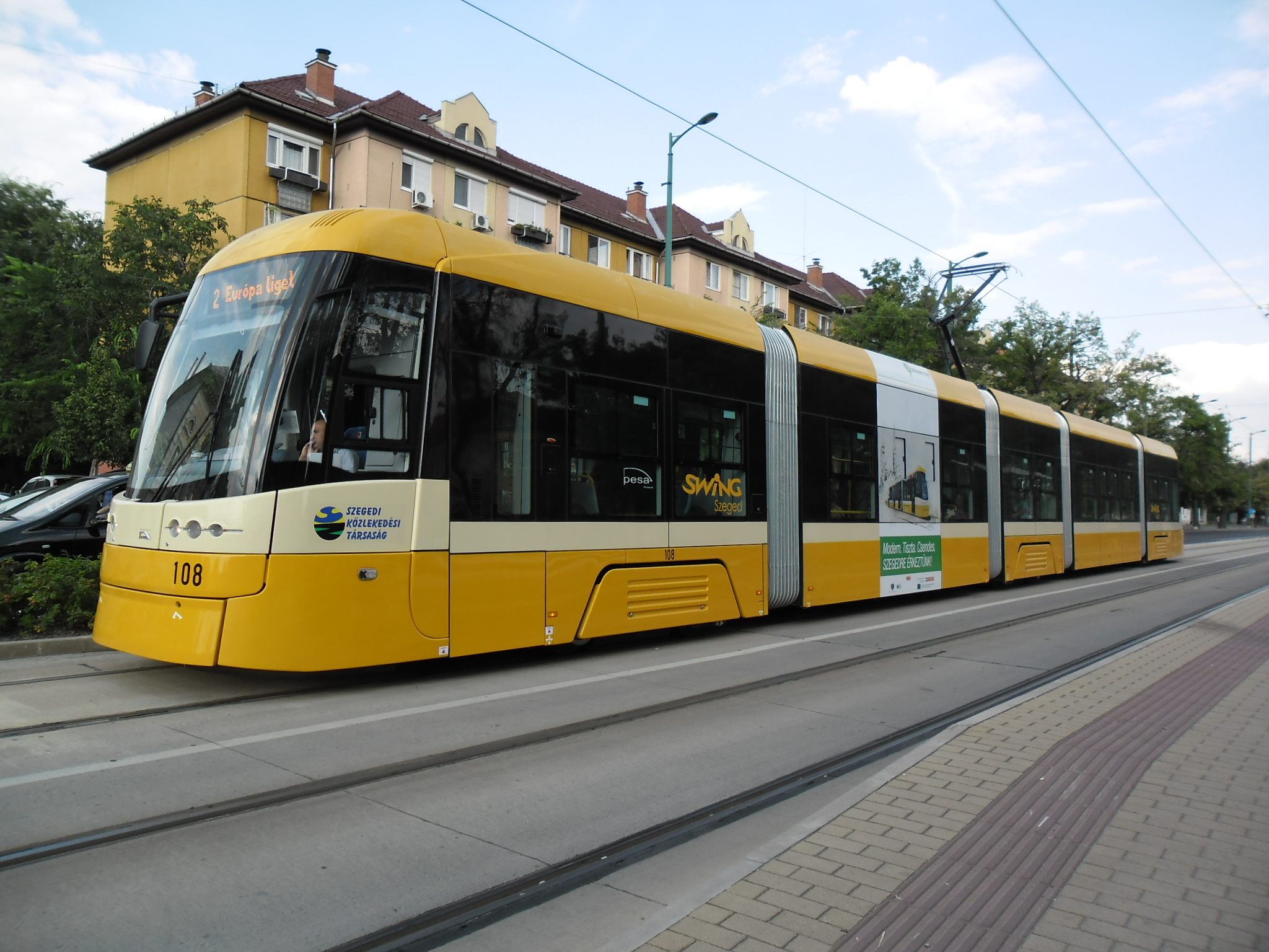 PESA 120Nb w Segedynie